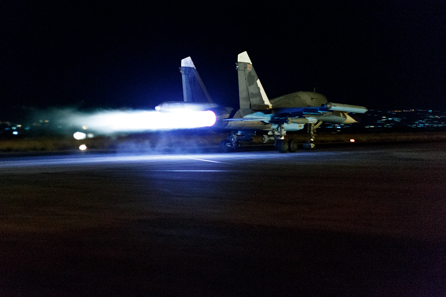 Ночные вылеты с авиабазы «Хмеймим» в Сирии